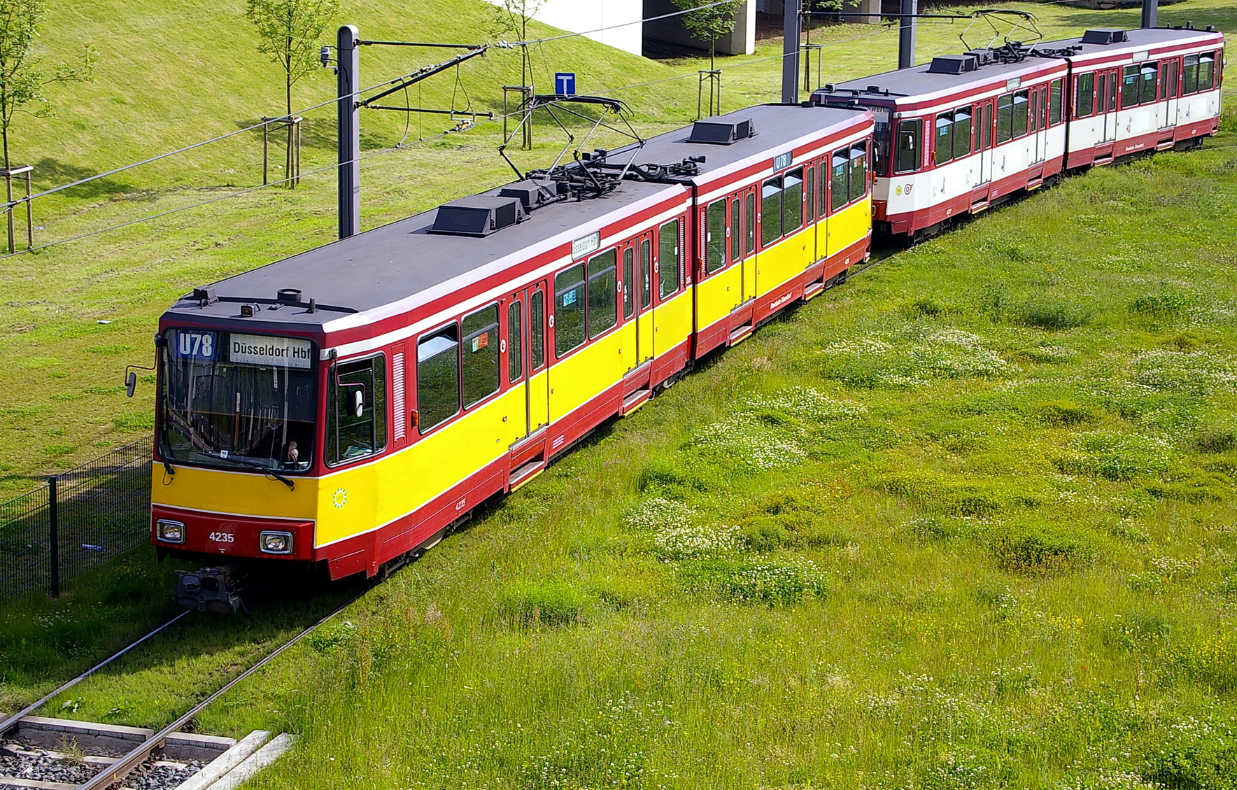 Straßenbahn der Rheinbahn U78 in Düsseldorf